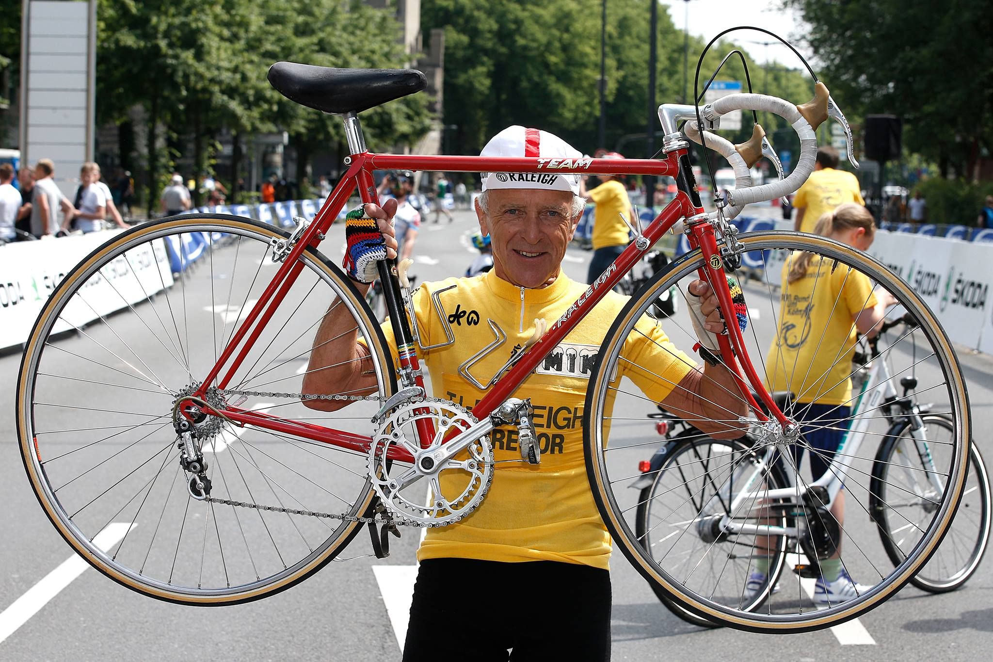 Klaus-Peter Thaler, deutscher Radrennfahrer, Retro-Rennen "Rund um Köln"